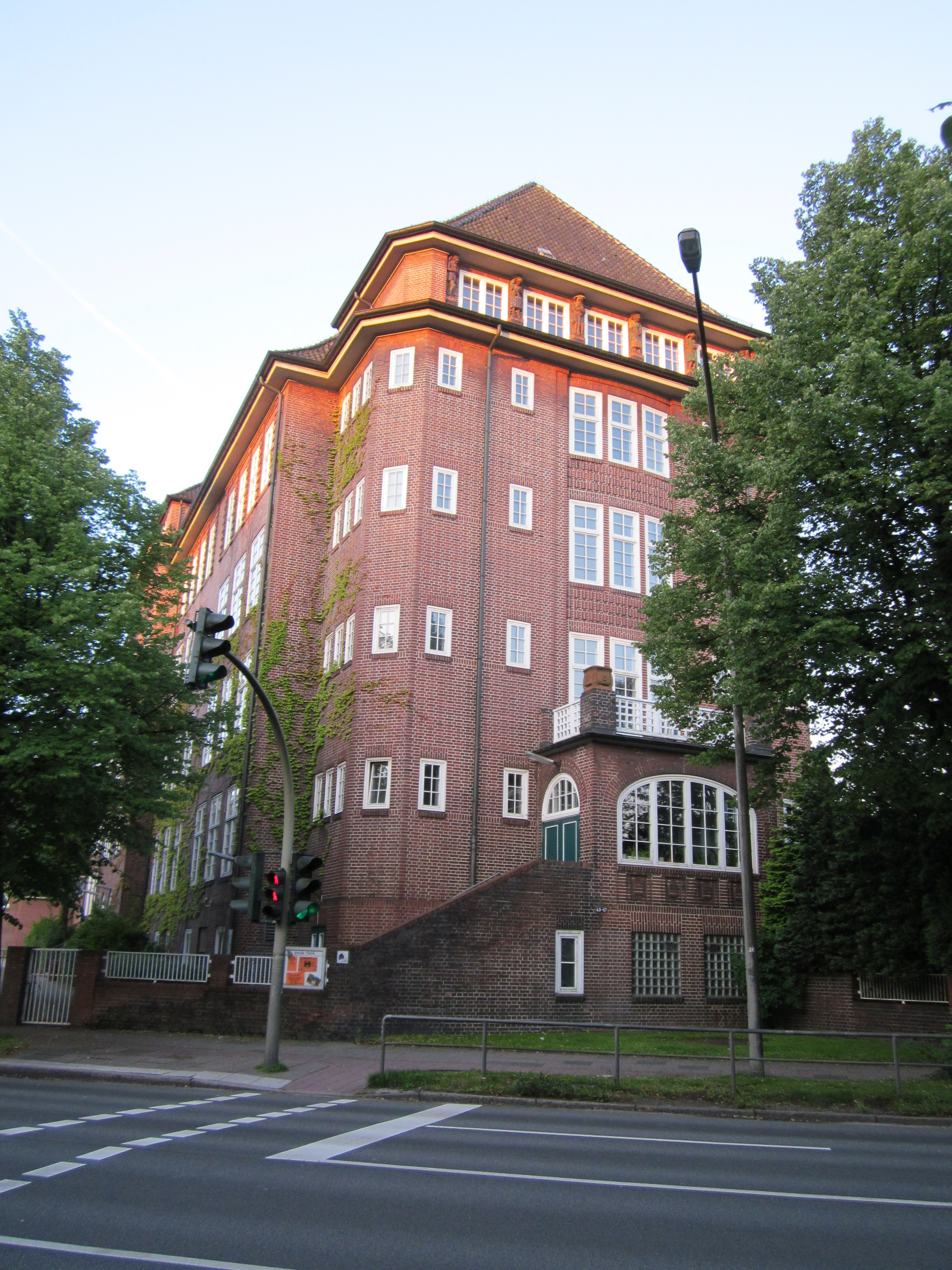 Die Schule Tieloh wurde 1913/14 nach Plänen von Fritz Schumacher als Volksschule für das Neubaugebiet Barmbek-Nord errichtet. Sie ist heute ein Standort der Stadtteilschule Barmbek und steht seit dem 4. August 2009 unter Denkmalschutz. This is a photograph of an architectural monument.